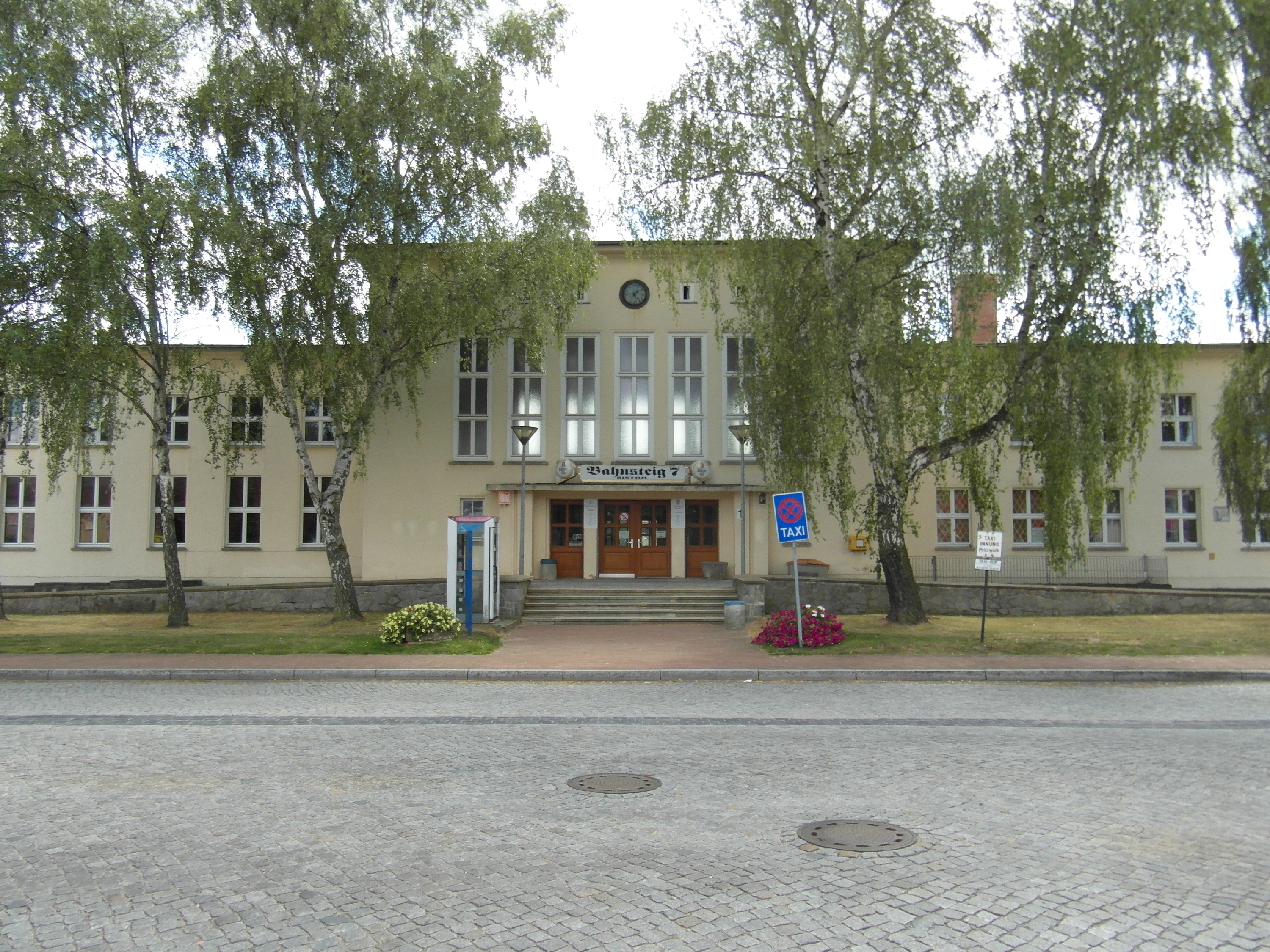 Bahnhof Pritzwalk im Landkreis Prignitz in Brandenburg